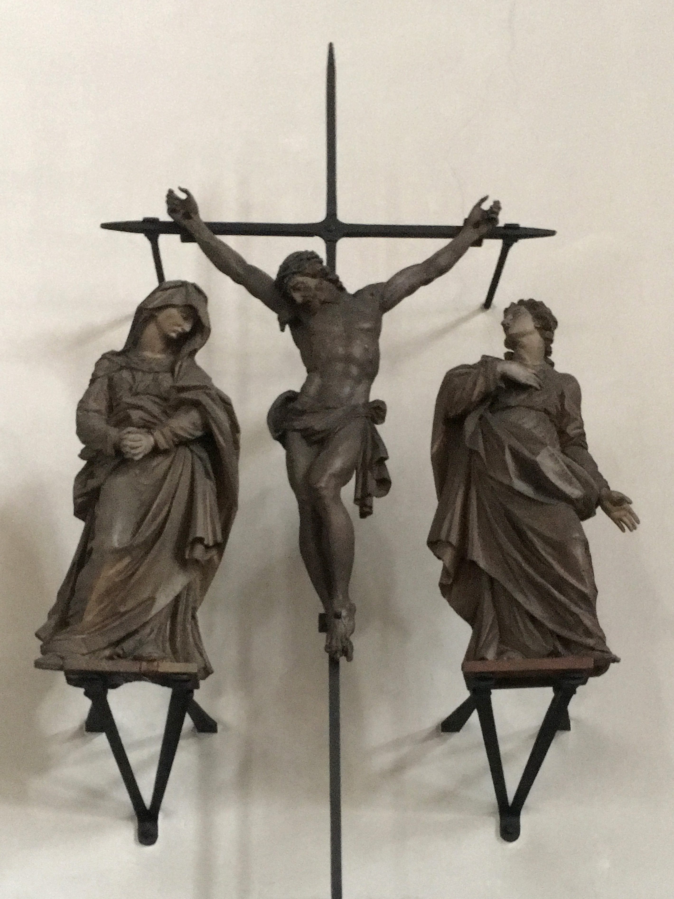 Wesel, St Mariä Himmelfahrt, Barocke Kreuzigungsgruppe